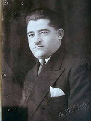 رمضانعلی شاهرخ در جوانی